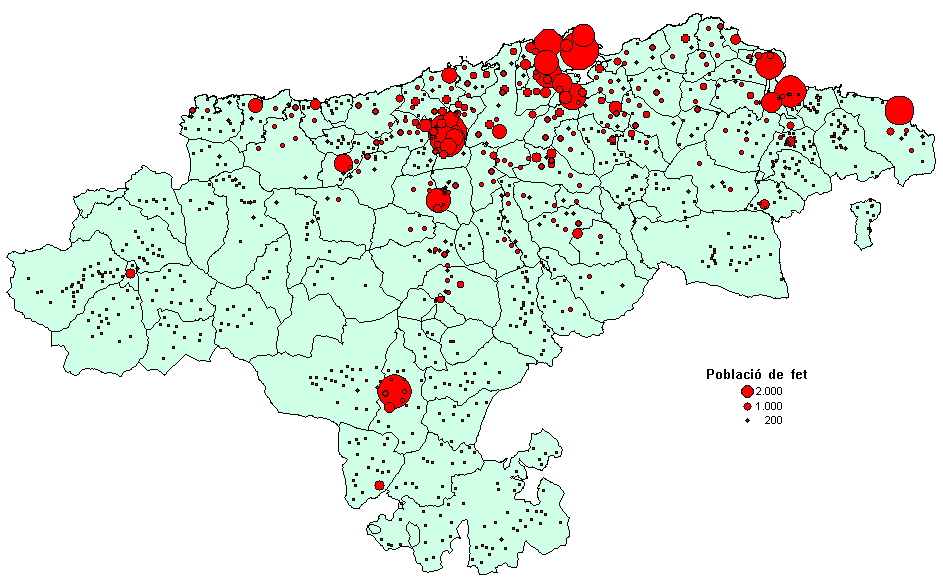 Poblament de Cantàbria.